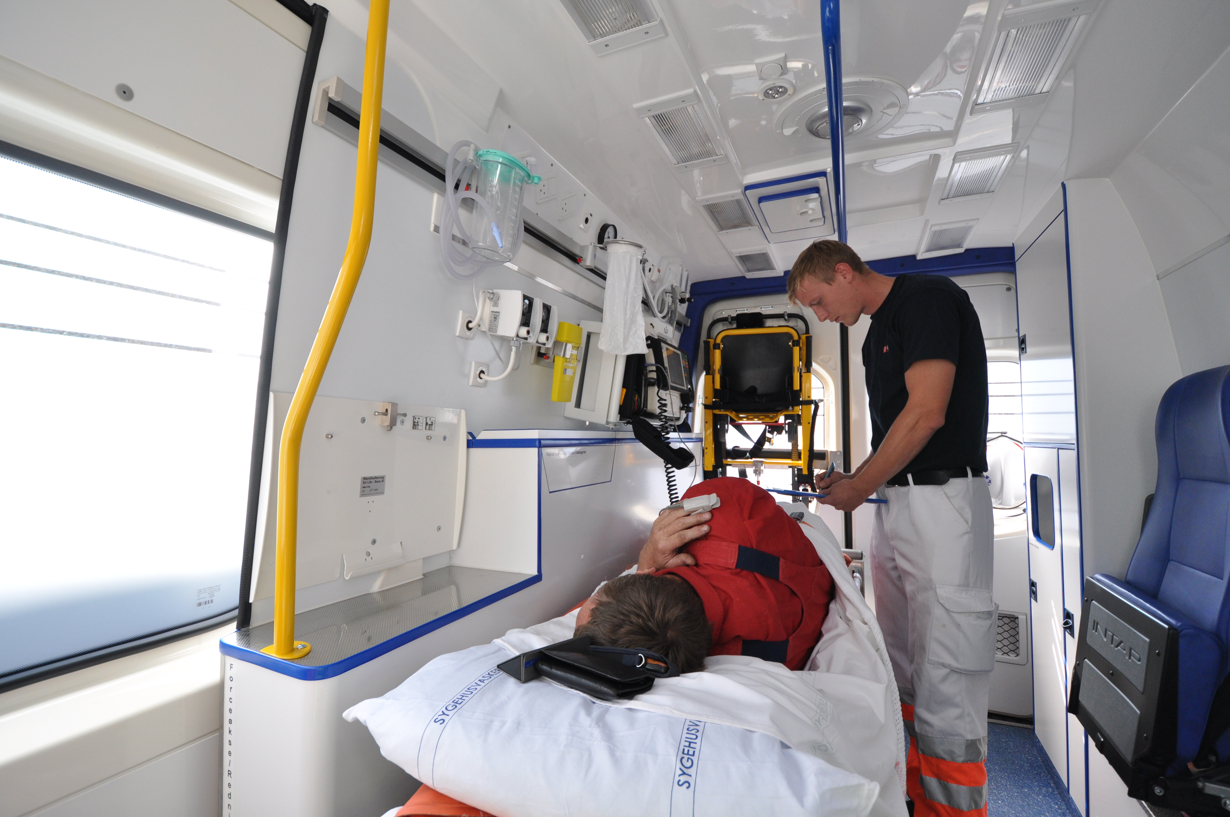 Præhospital behandling i ambulance.